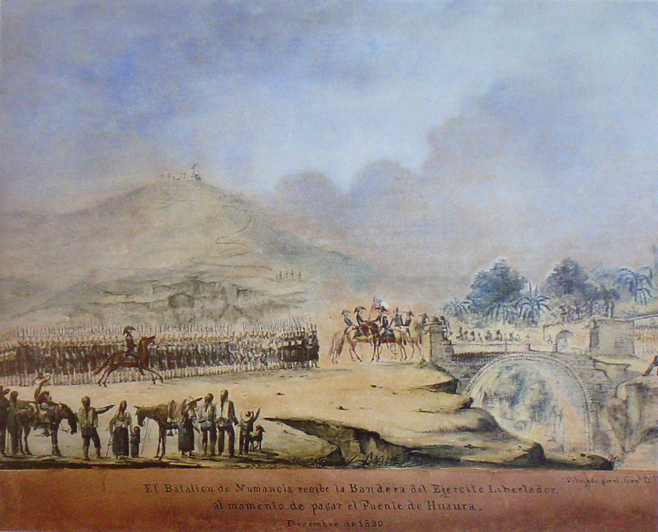 Acuarela de Bernardo O’Higgins, El Batallón Numancia recibe la Bandera del Ejército Libertador al momento de pasar el puente de Huaura. Diciembre 1820, 30x40 cms, Perú, 1823 (aproximadamente).